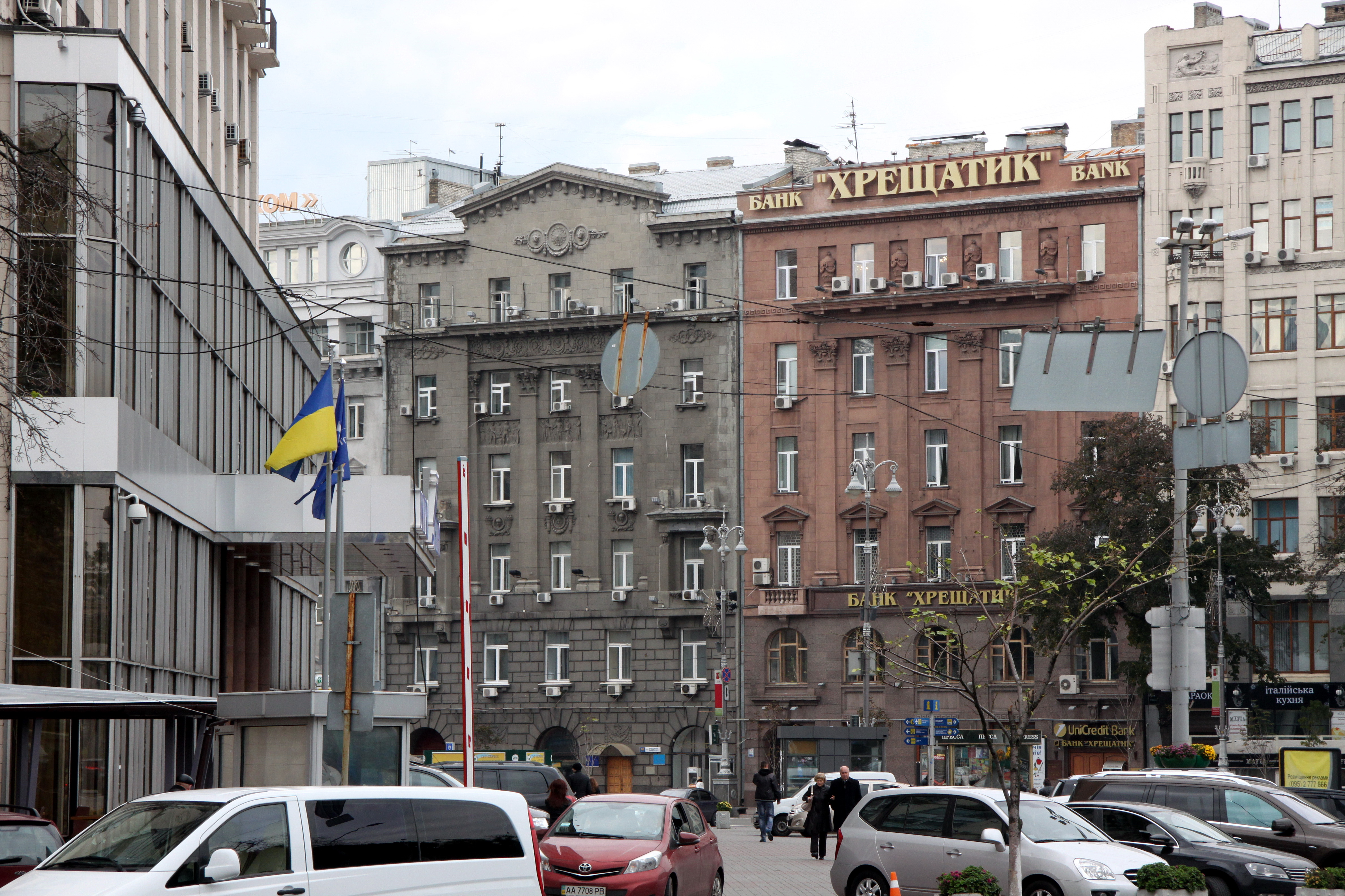 Будинок Волзько-Камського банку, Київ, Хрещатик вул., 10-а